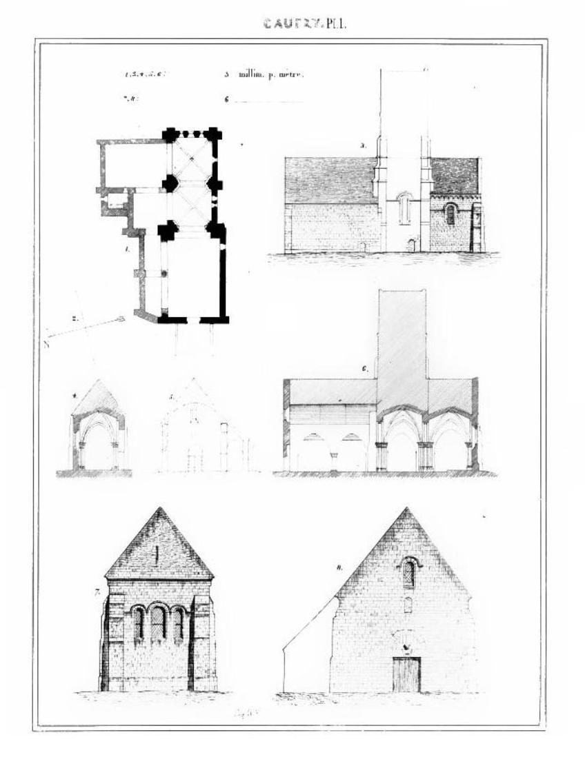 Croquis d'architecture relevés sur place par Eugène Woillez.